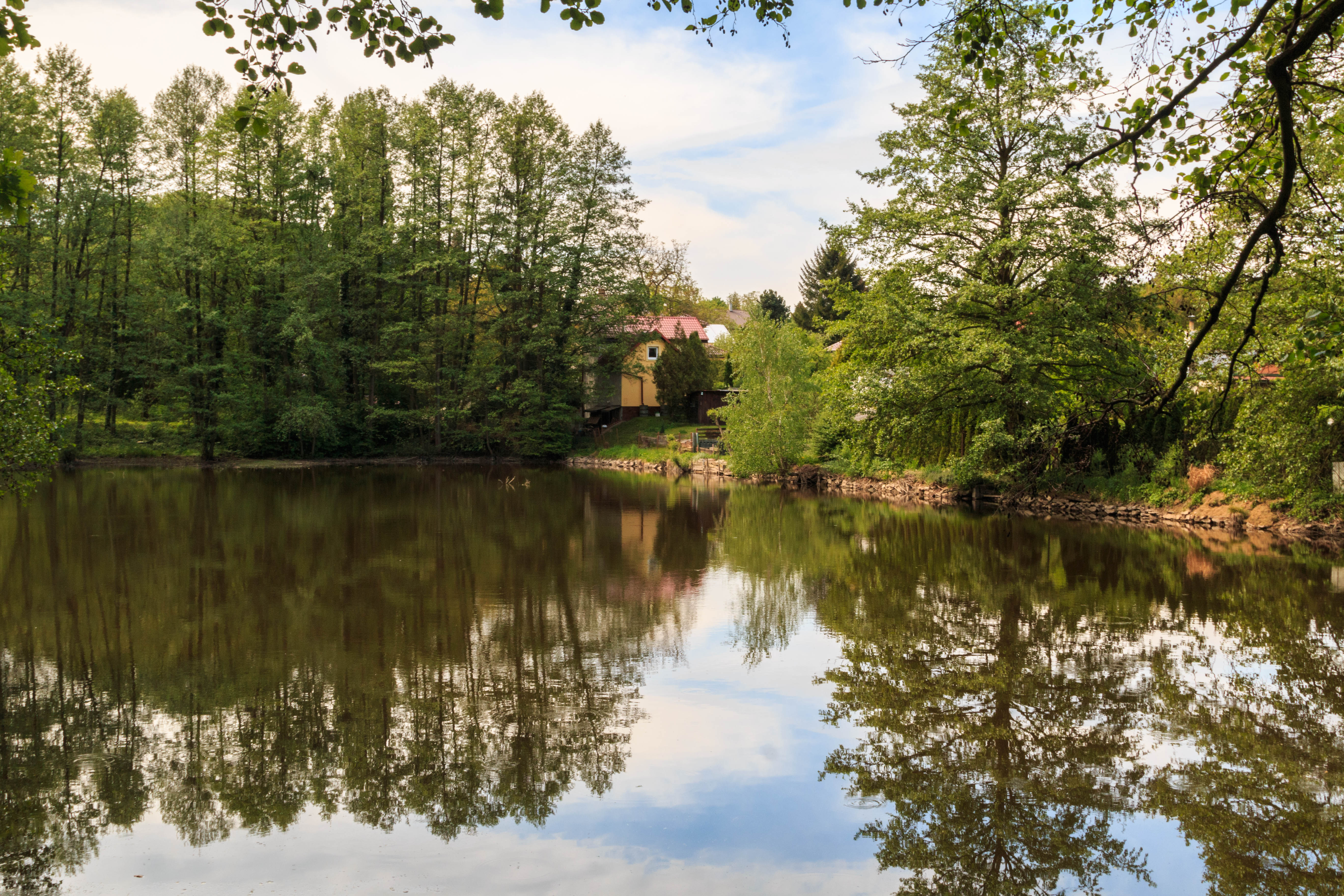 Rybník Ježkovka v Heřmanově Městci Project: Vodstvo.